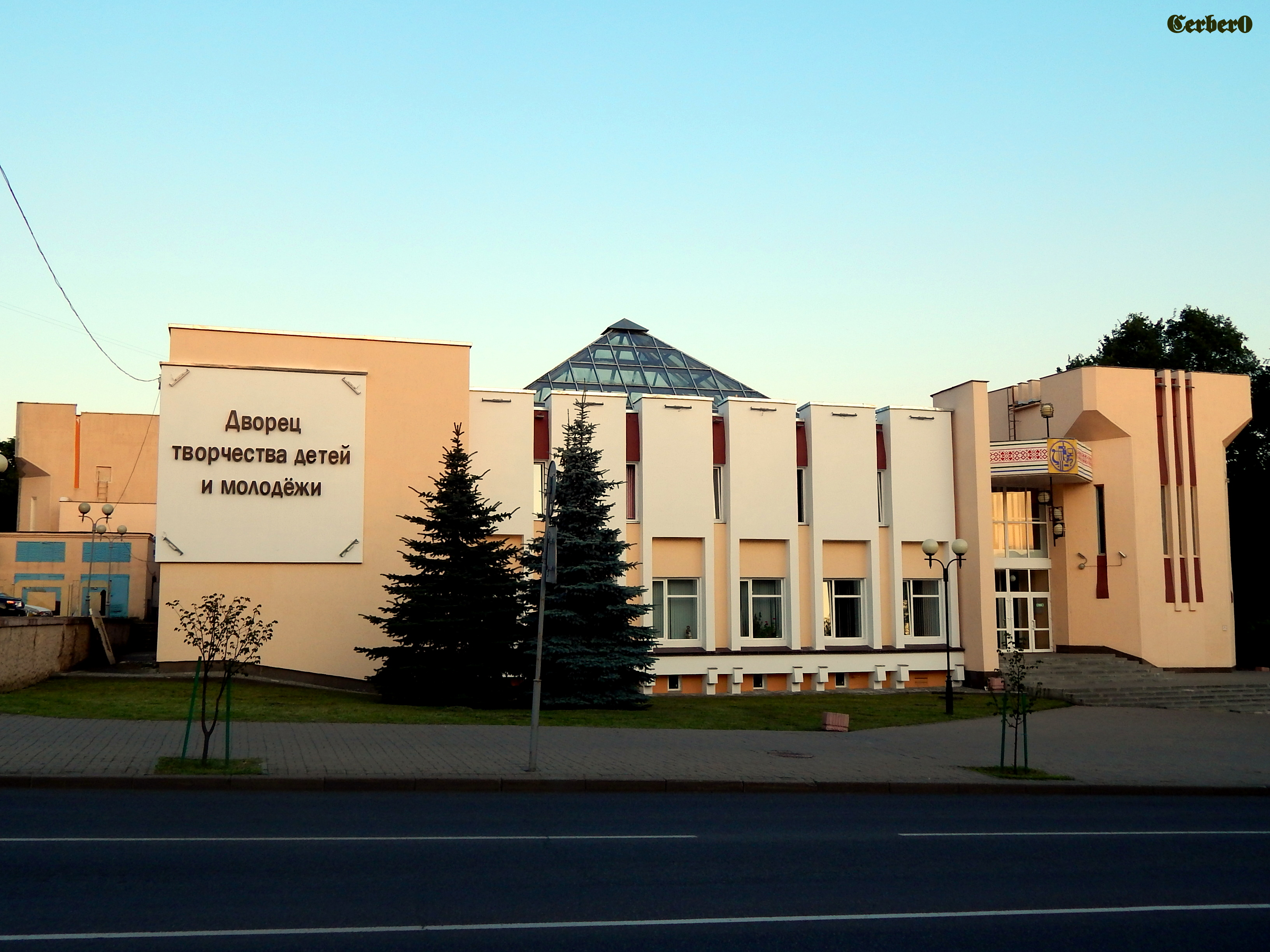 Palace of Children and Youth, Gomel, палац творчасці дзяцей і моладзі, г.Гомель